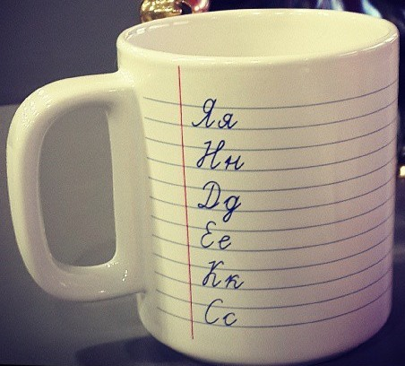 Кружка от "Яндекса"